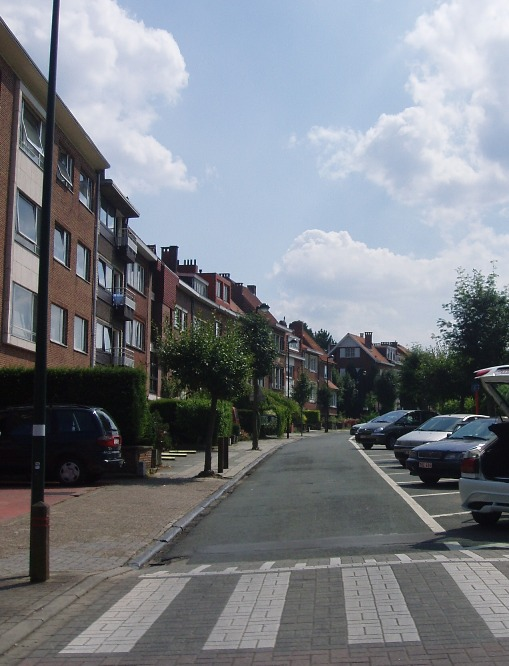 avenue André Drouart Auderghem Belgium